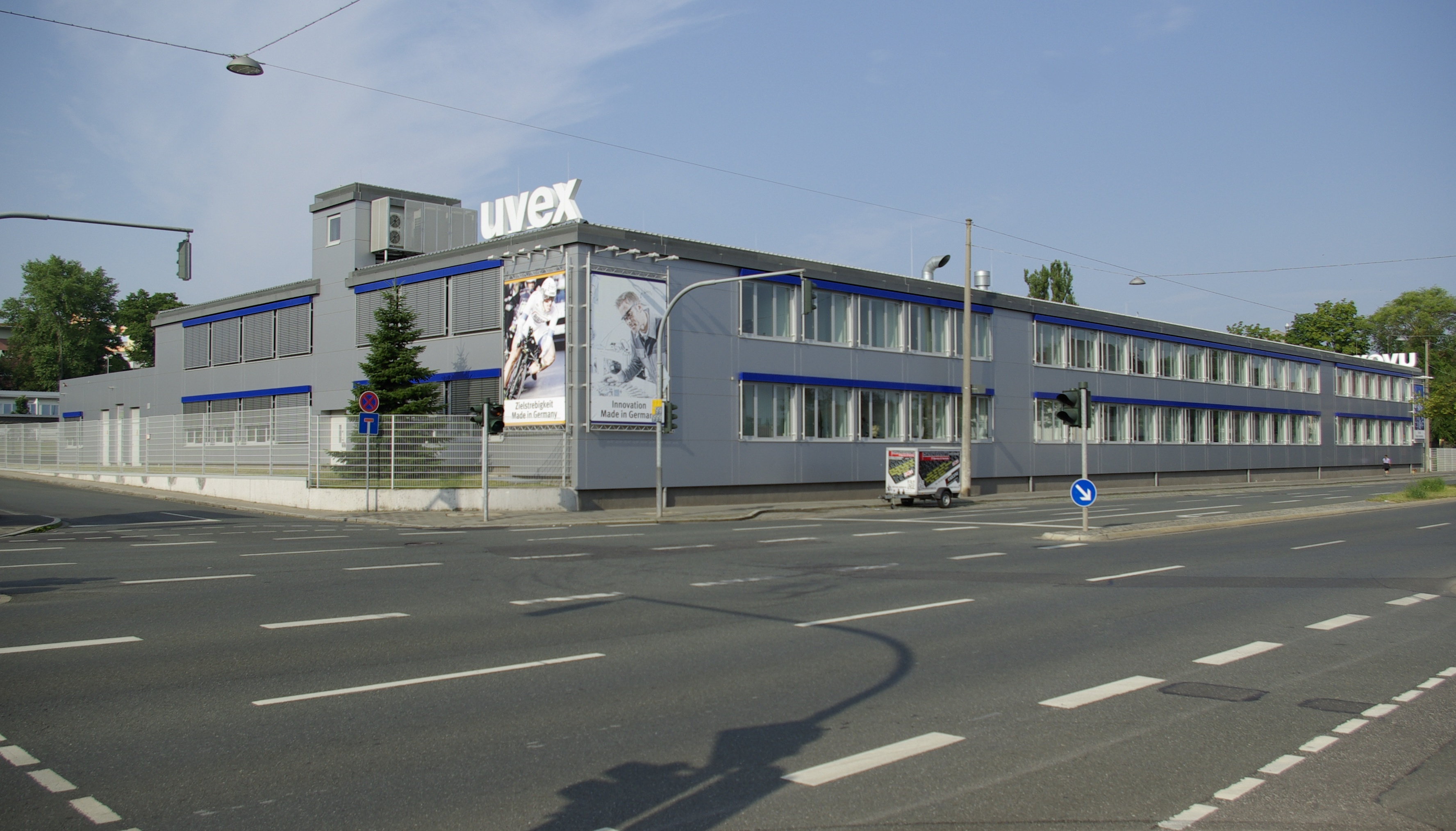 Uvex-Standort in der Würzburger Straße 189 in Fürth